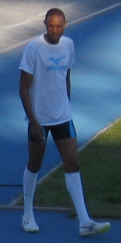 Godfrey Mokoena Paavo Nurmen kisoissa, Paavo Nurmen stadionilla, Turussa, 24. kesäkuuta 2009